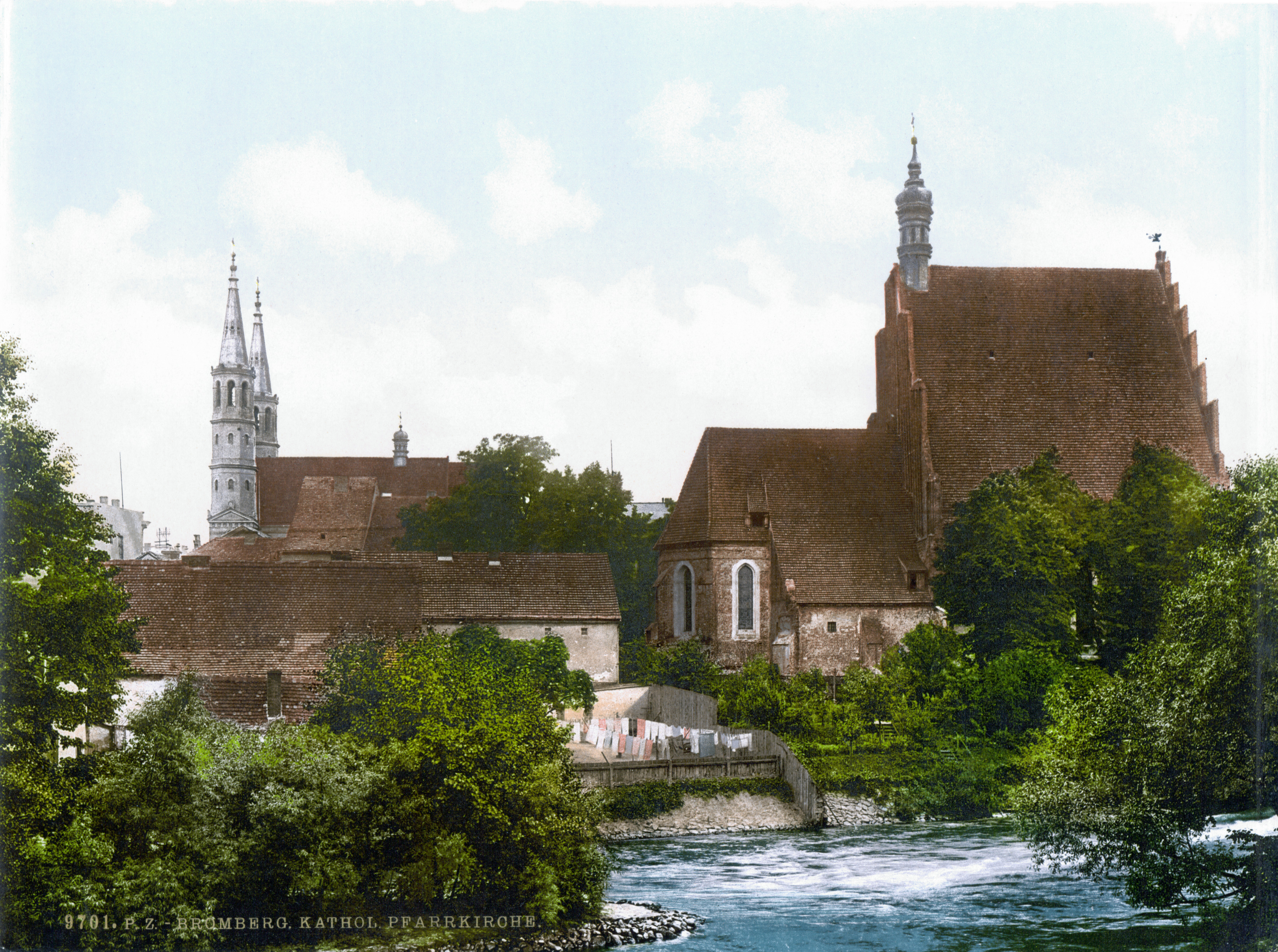 Katholische Pfarrkirche in Bromberg, Westpreußen.